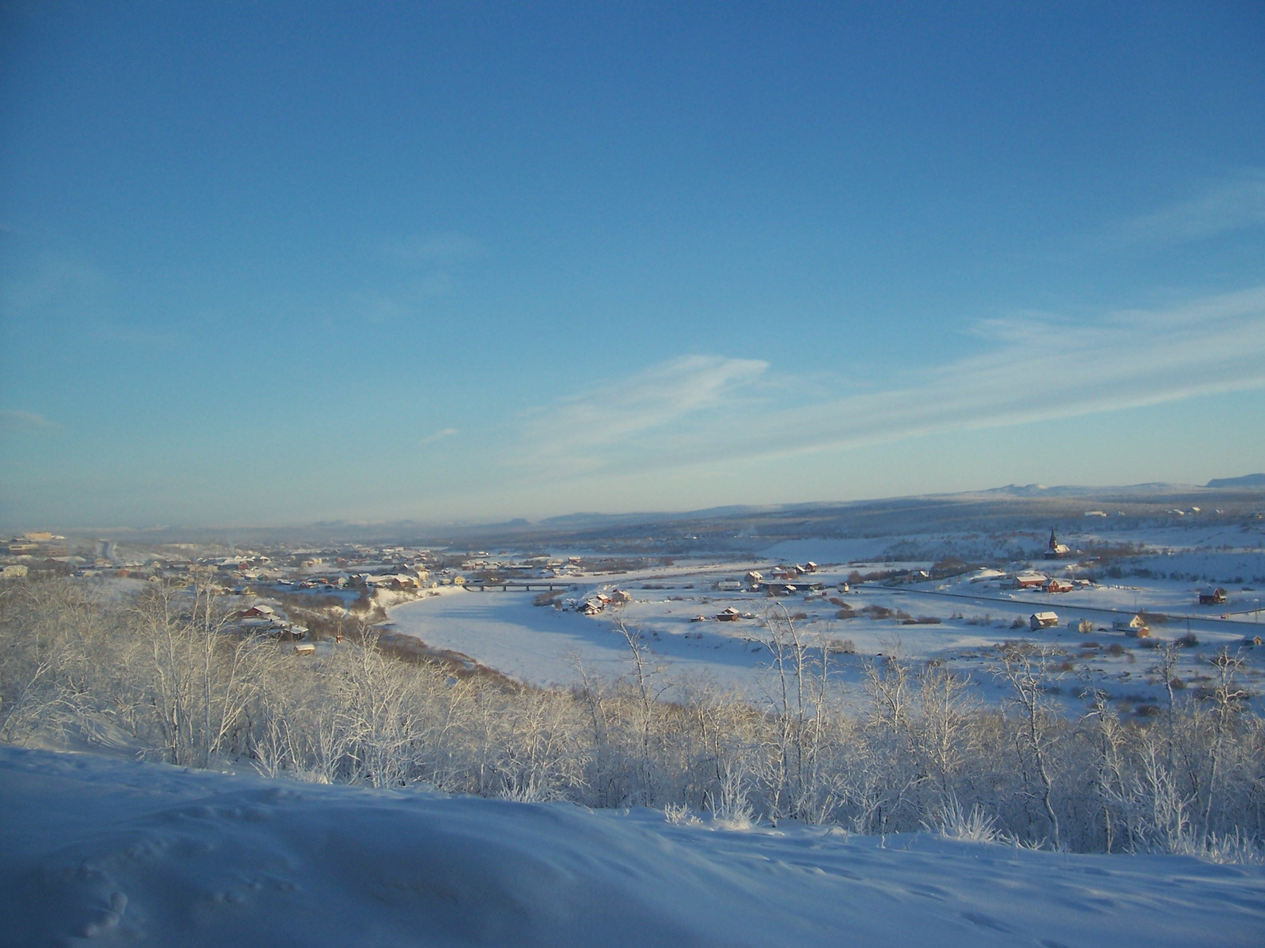 Kautokeino om vinteren